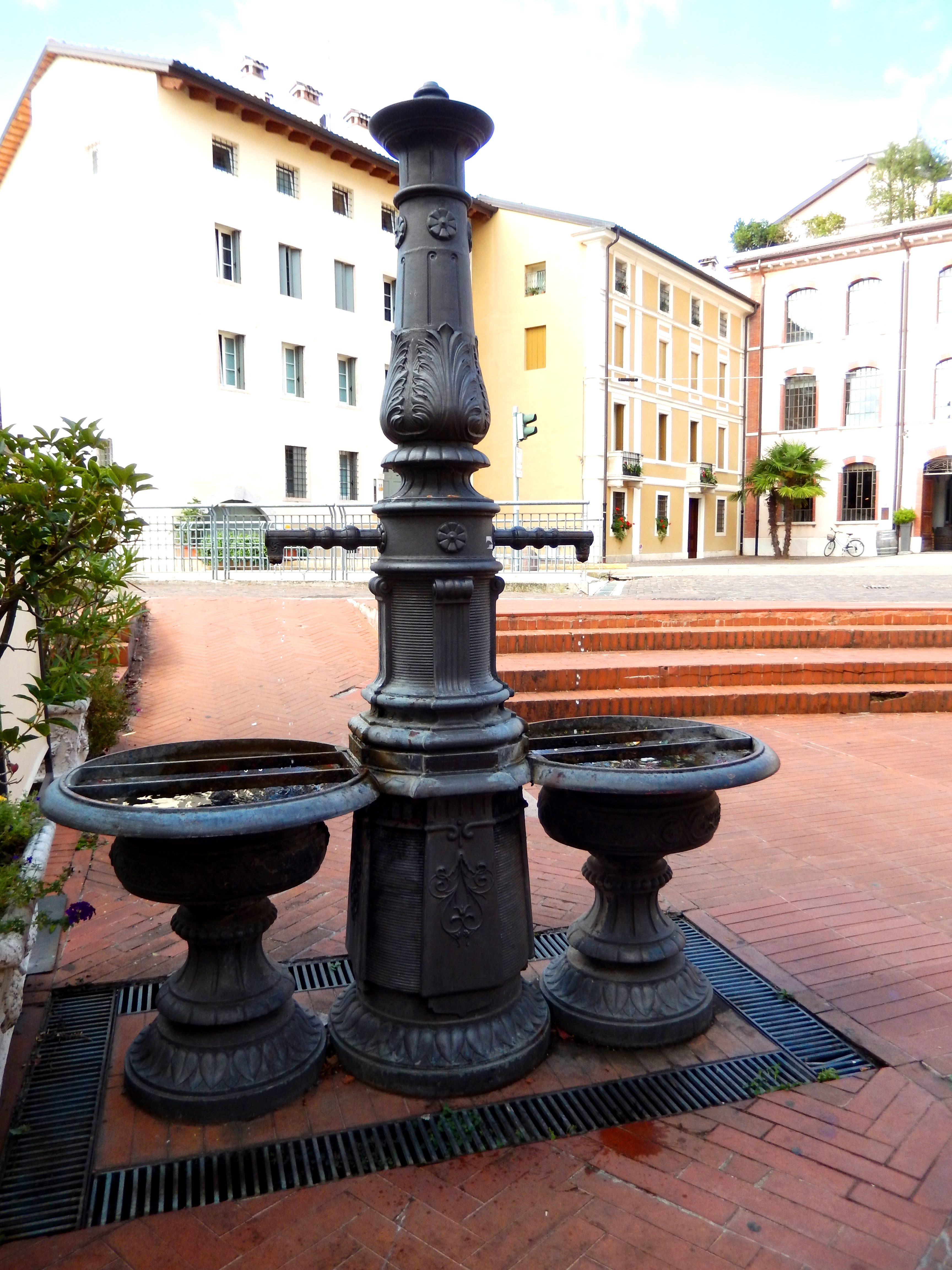 Fontana in ghisa This is a photo of a monument which is part of cultural heritage of Italy.